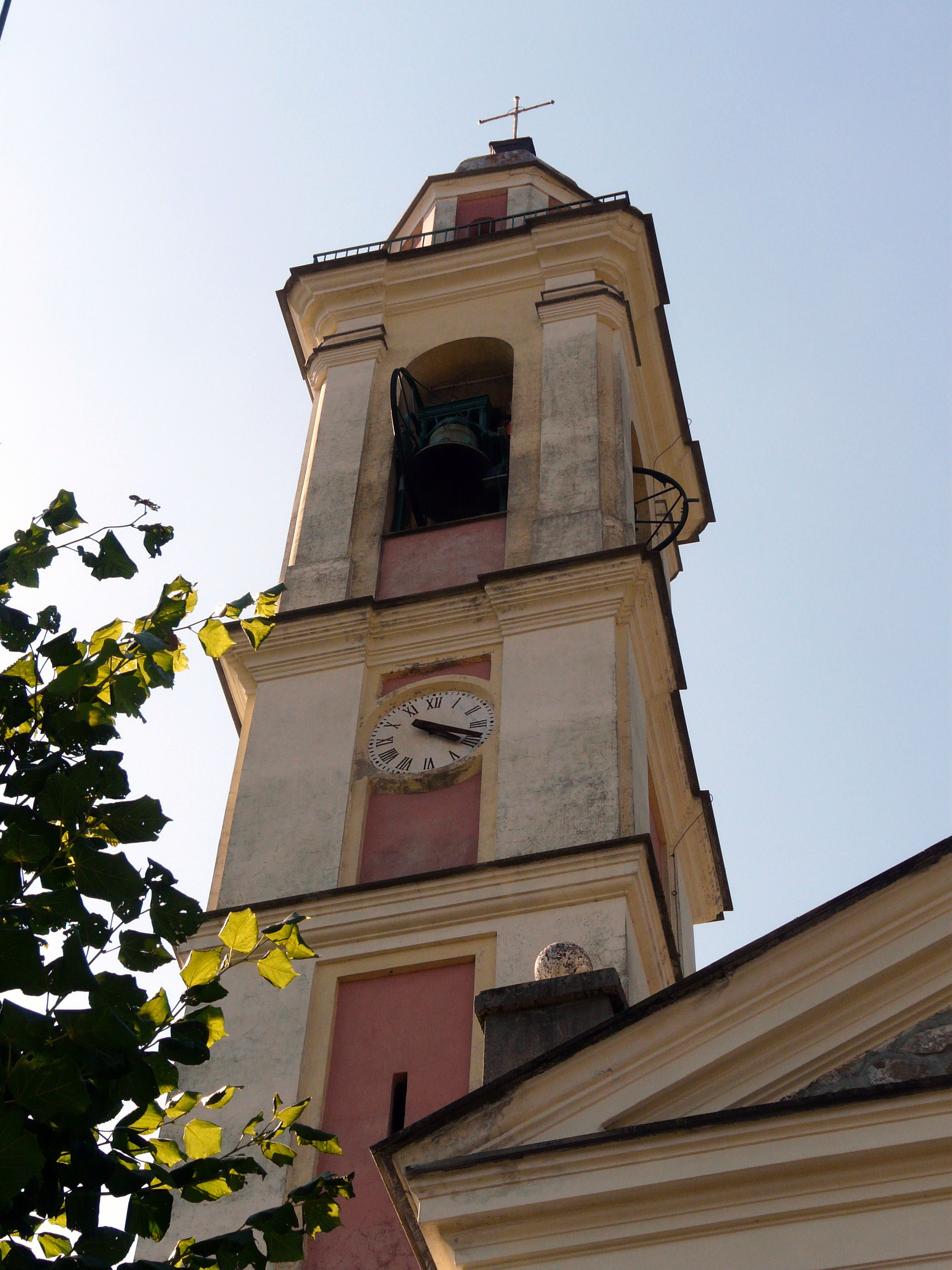 Campanile della chiesa di San Giovanni Battista, Priosa, Rezzoaglio, Liguria, Italia